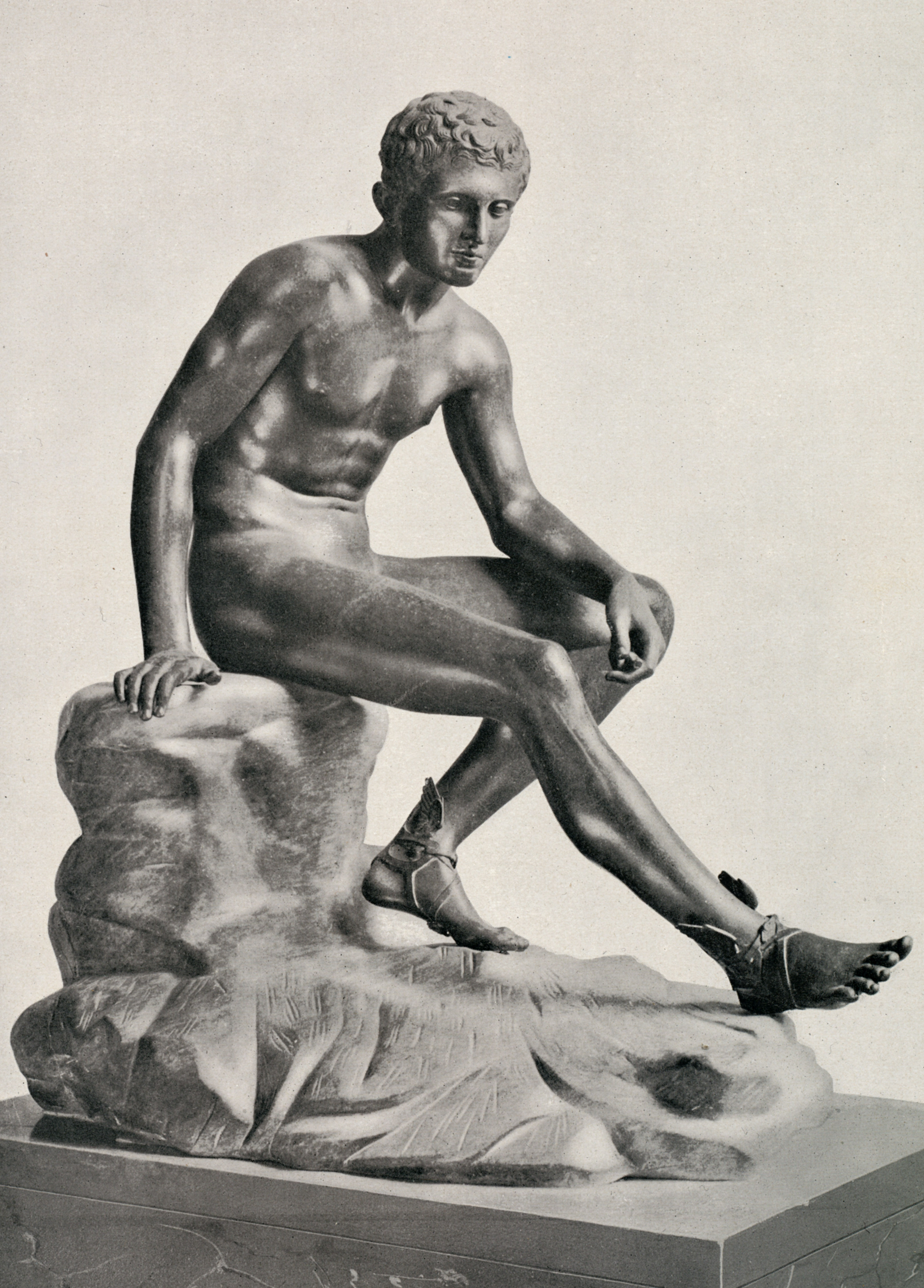 Der Merkur aus Herkulaneum, Foto vor 1907